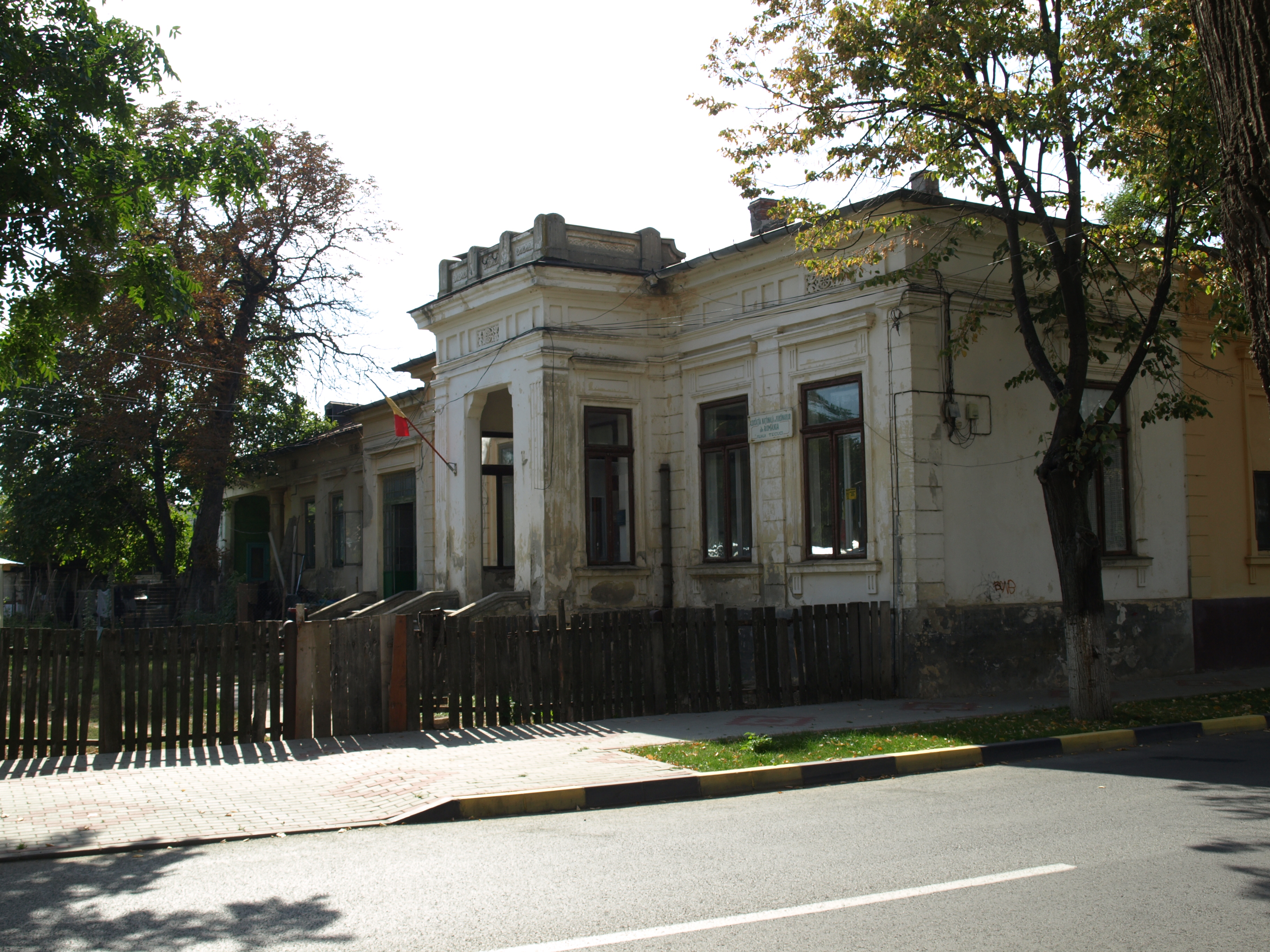 Casa Meran- Manoliu